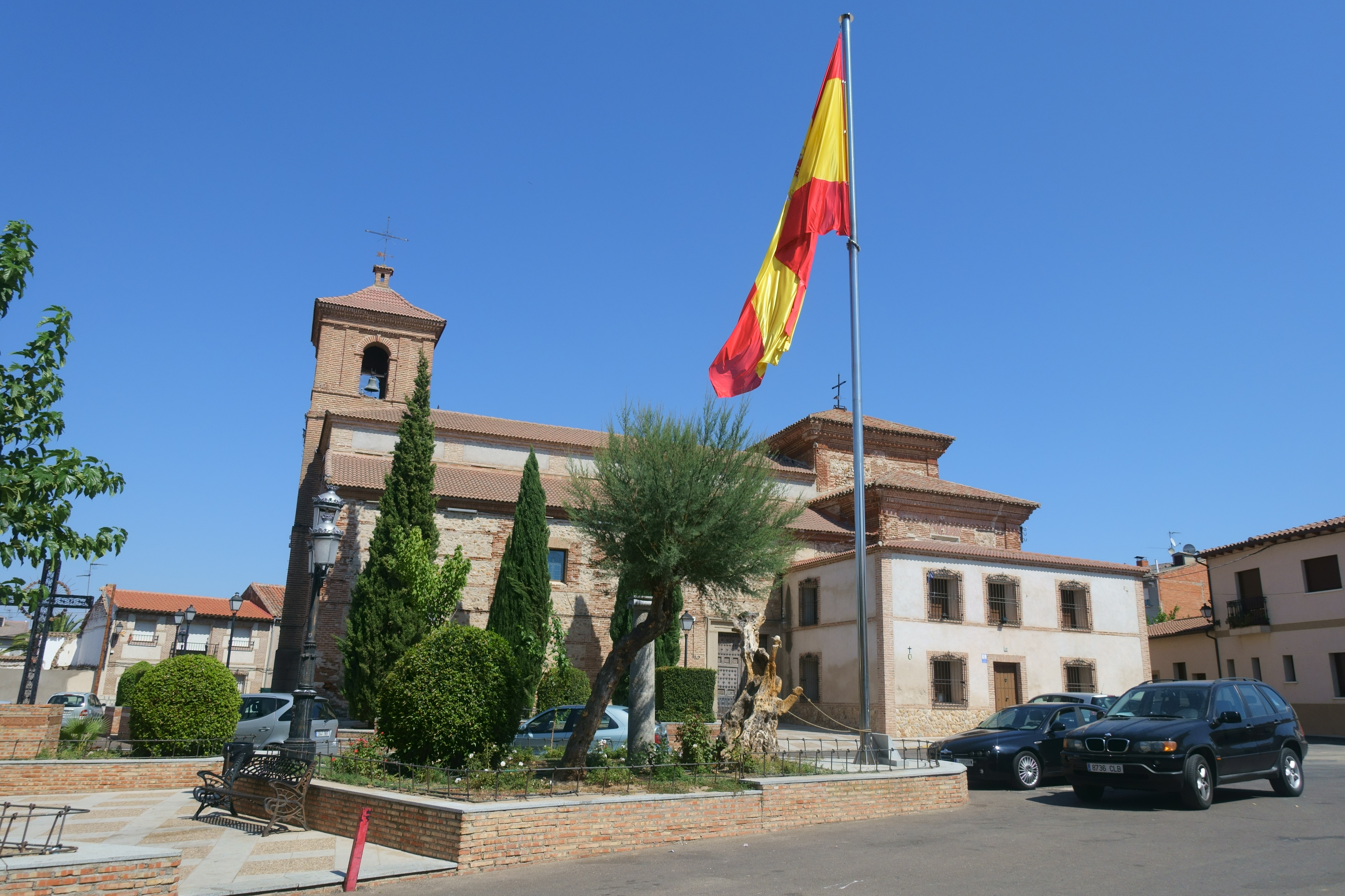 Iglesia de San Julián y Santa Basilisa, El Casar de Escalona (Toledo, España).